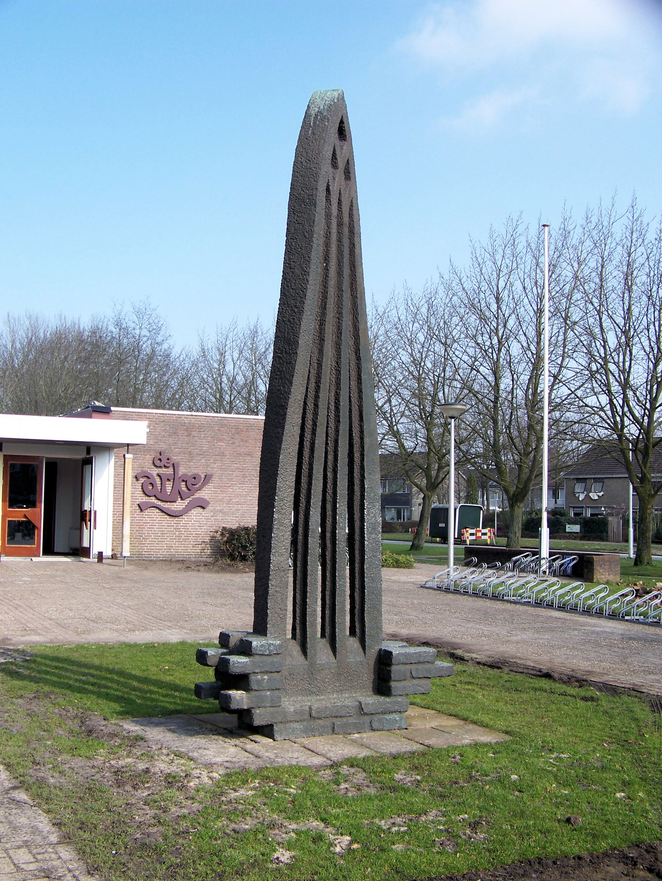 Gotisch raam (1975) van Wladimir de Vries, in Drachten.